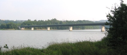 Talsperre Zeulenroda mit Brücke (Straße Auma-Zeulenroda)